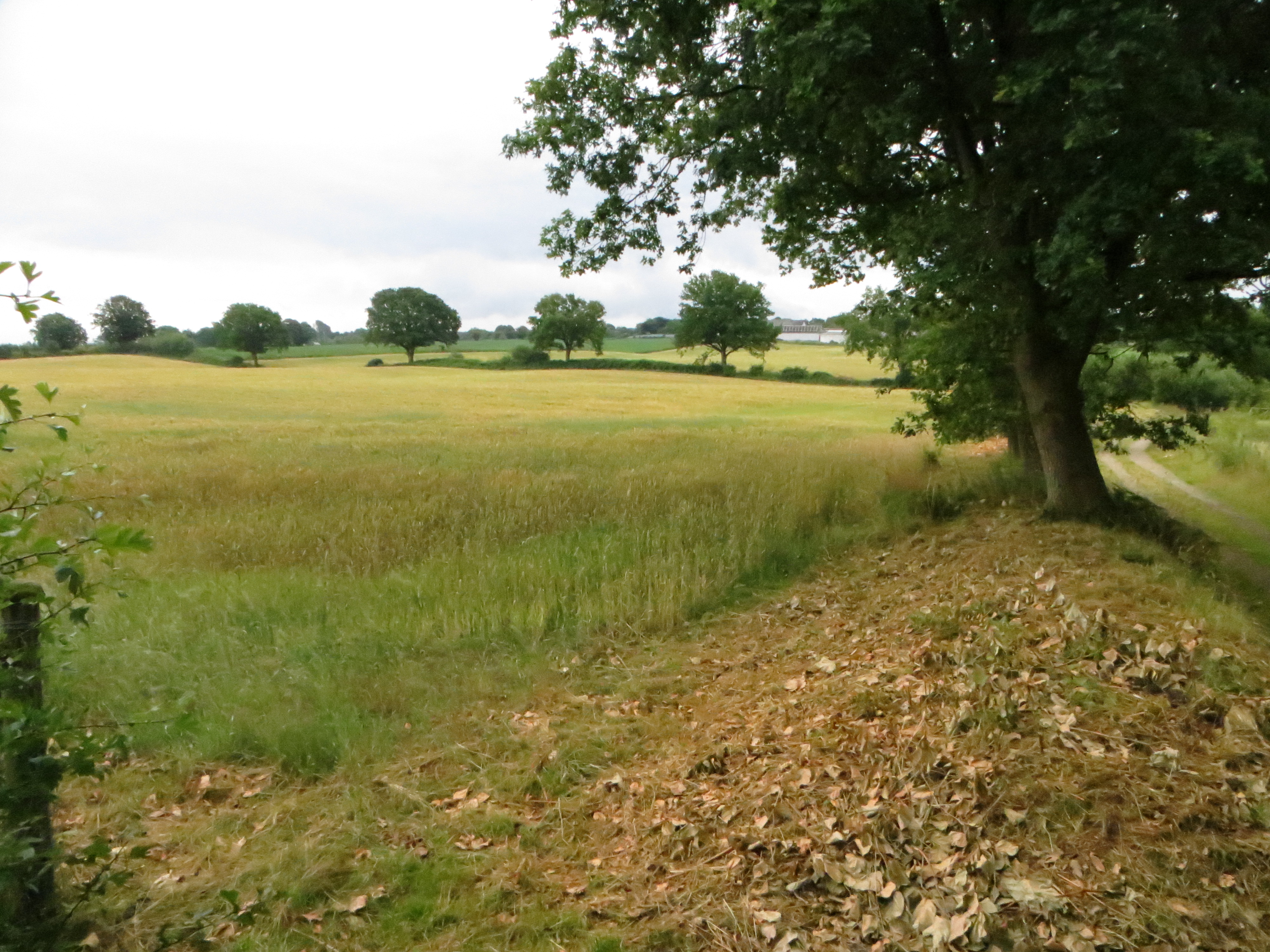 Blick vom Aussichtspunkt Blocksberg ungefähr Richtung Südost, Bild 01